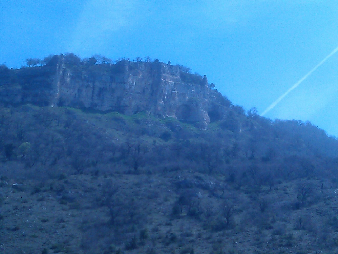 Desde el Fraile, 16 de noviembre de 2014